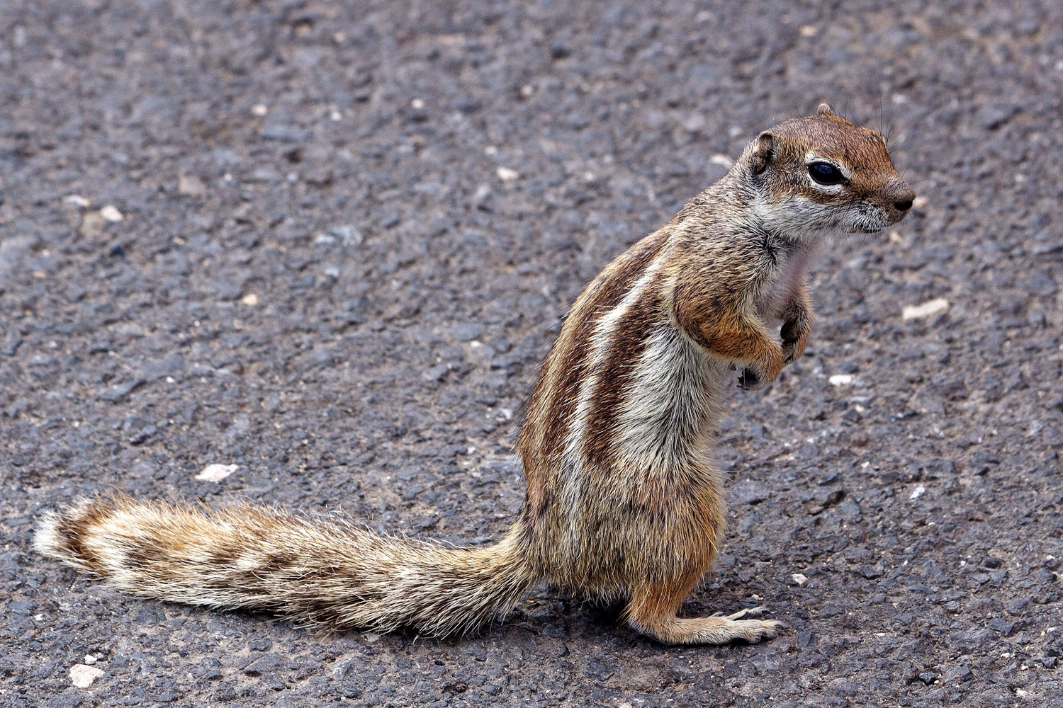 Fuerteventura, Kanarische Inseln, Spanien, Datum/Uhrzeit: 04.06.2011 14:03:18